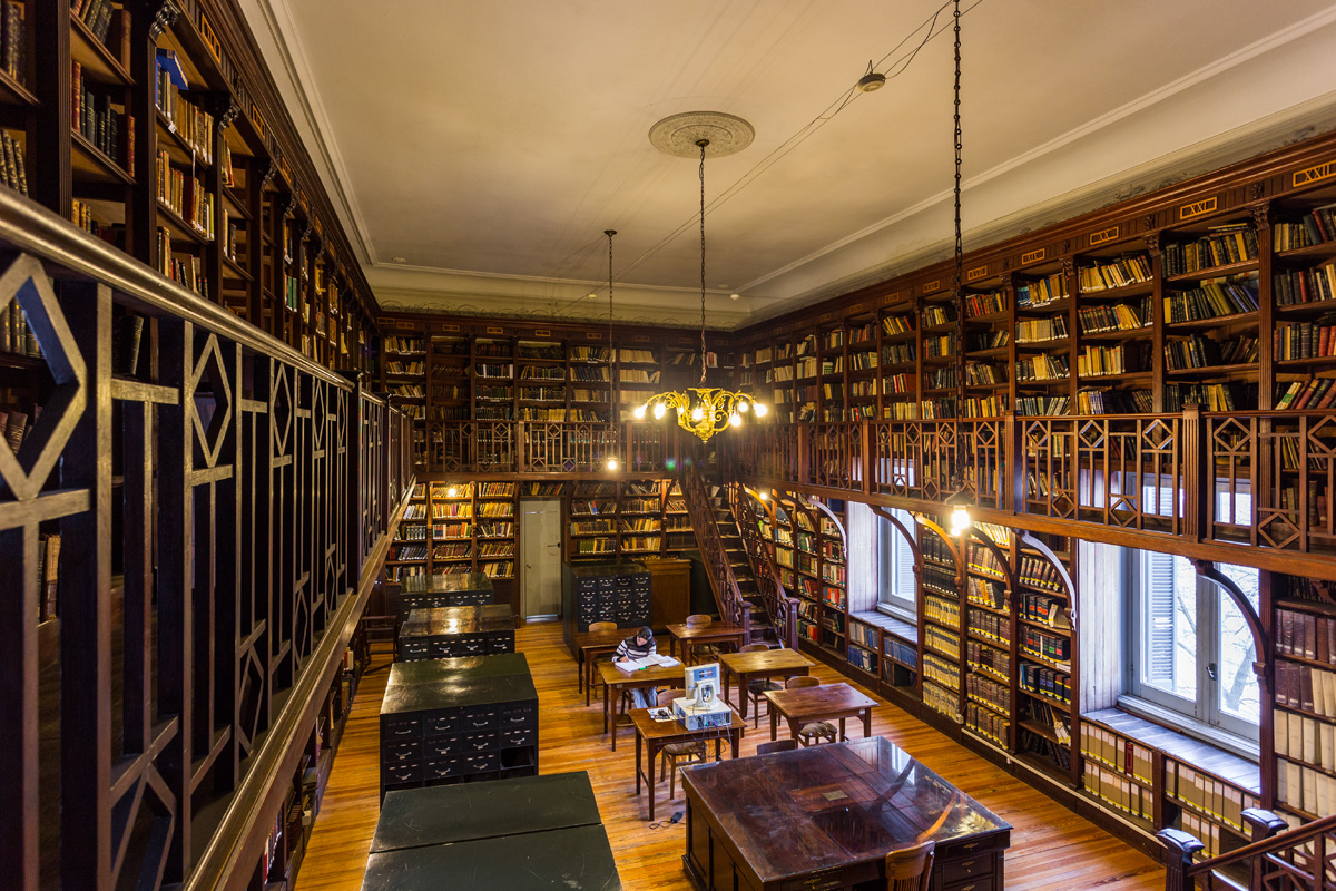 Universidad de la República. Ubicada en el departamento de Montevideo